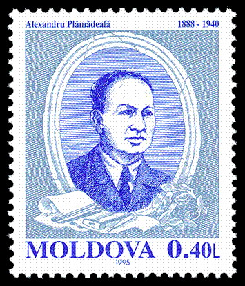 Source: Post of Moldova